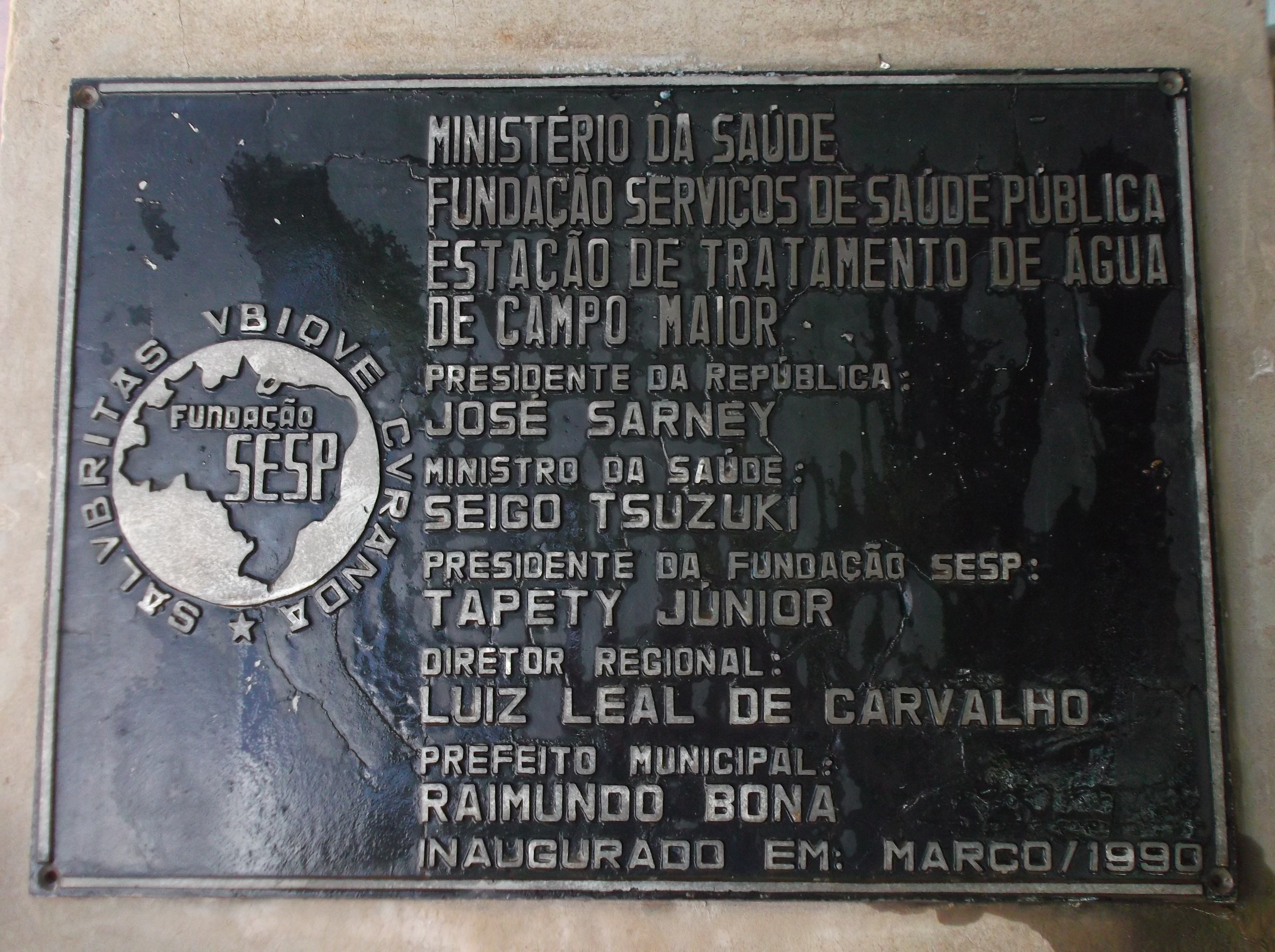 Pedra fundamental com placa de inauguração de Estação de Tratamento e Água feita pela Fundação Serviços de Saúde Pública do Ministério dasaúde do Brasil em 1990.